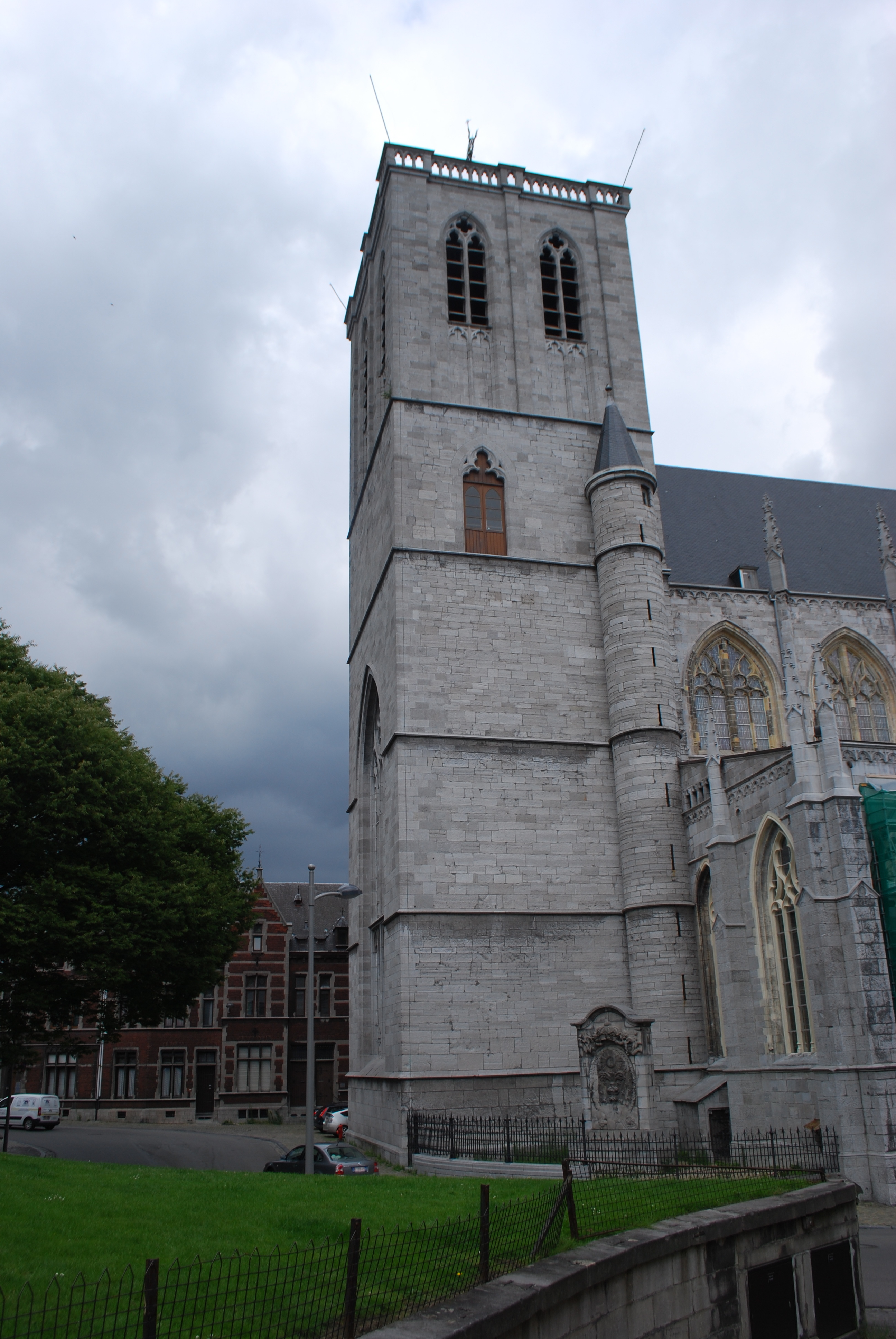 La tour de l'église Saint-Martin à Liège.